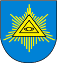 Herb Kończyc Wielkich w powiecie cieszyńskim, gminie Hażlach